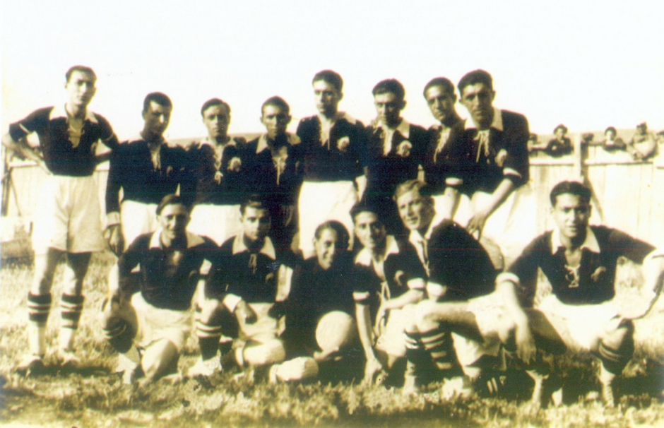 Η ομάδα του ΠΑΟΚ την περίοδο 1928-29